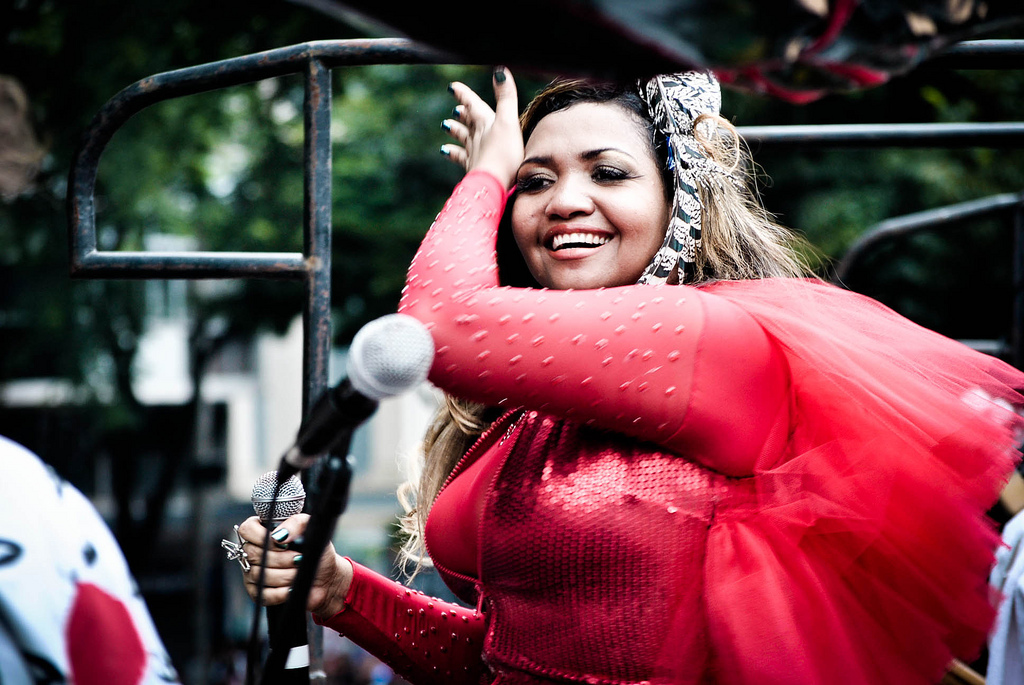 Gaby Amarantos no bloco da Banda Mole, pré-Carnaval de rua de Belo Horizonte.